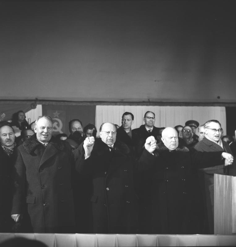 Berlin, VI. SED-Parteitag, Ulbricht, Chruschtschow Zentralbild /Junge 14.1.1963 N.S. Chruschtschow in Berlin eingetroffen Der Erste Sekretär des ZK der KPdSU, N.S. Chruschtschow, traf am Abend des 14.1.1963 an der Spitze der sowjetischen Delegation zum VI. Parteitag der SED in der Hauptstadt der DDR ein. Die repräsentative Abordnung der sowjetischen Bruderpartei wurde auf dem Berliner Ostbahnhof vom Ersten Sekretär der ZK der SED, Walter Ulbricht, und weiteren Mitgliedern des Politbüros herzlich willkommen geheißen. UBz: Während der Begrüßungskundgebung in der Vorhalle des Ostbahnhofes. (V.l.n.r.) Nikolia Podgorny, Mitglied des Prasidiums des ZK der KPdSU und Erster Sekretär des ZK der KP der Ukraine, Walter Ulbricht, N.S. Chruschtschow und der Kandidat des Politbüros der ZK der SED und 1. Sekretär der Bezirksleitung Groß-Berlin der SED Paul Verner. Abgebildete Personen: Chruschtschow, Nikita S.: Ministerpräsident, erster Sekretär der KP, Sowjetunion (GND 118638378) Podgorny, Nikolai: Vorsitzender des Präsidiums des Obersten Sowjets, Sowjetunion Ulbricht, Walter: Staatsratsvorsitzender, Erster Sekretär des Zentralkomitees (ZK) der SED, Vorsitzender des Nationalen Verteidigungsrates, DDR Verner, Paul: Vorsitzender des Staatsrates, Sekretär des Zentralkomitees der SED, Präsident des Nationalrates der Nationalen Front, DDR